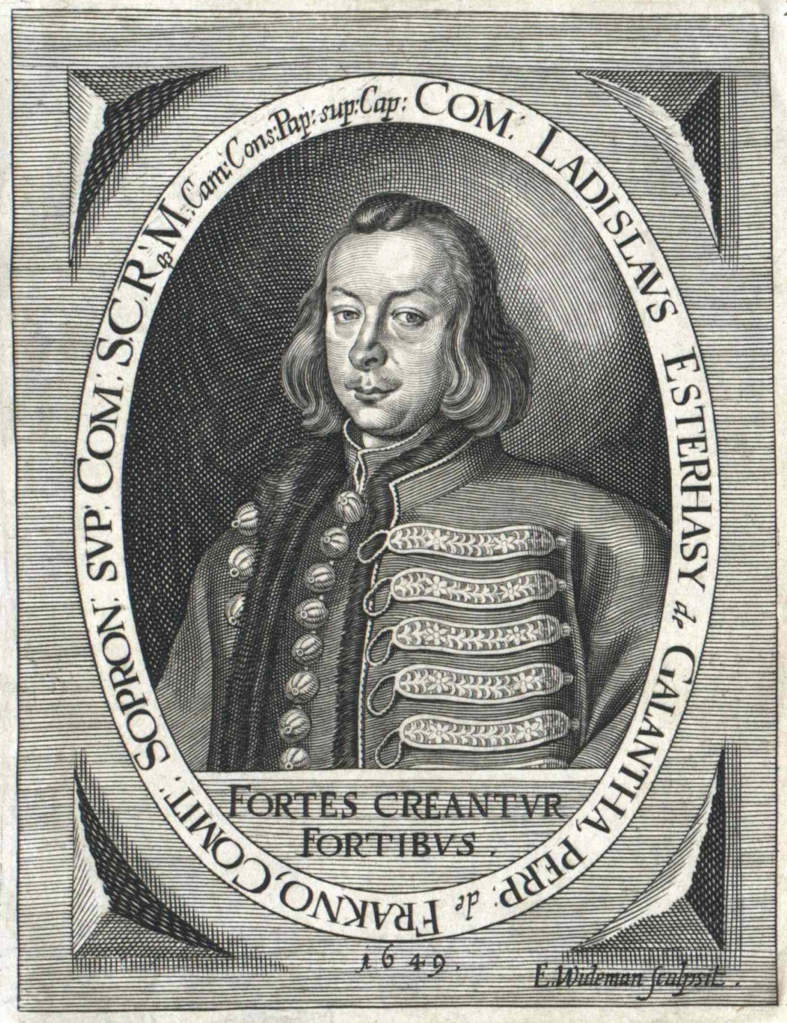 gróf Esterházy László (1626–1652) portréja. Elias Widemann rézmetszete